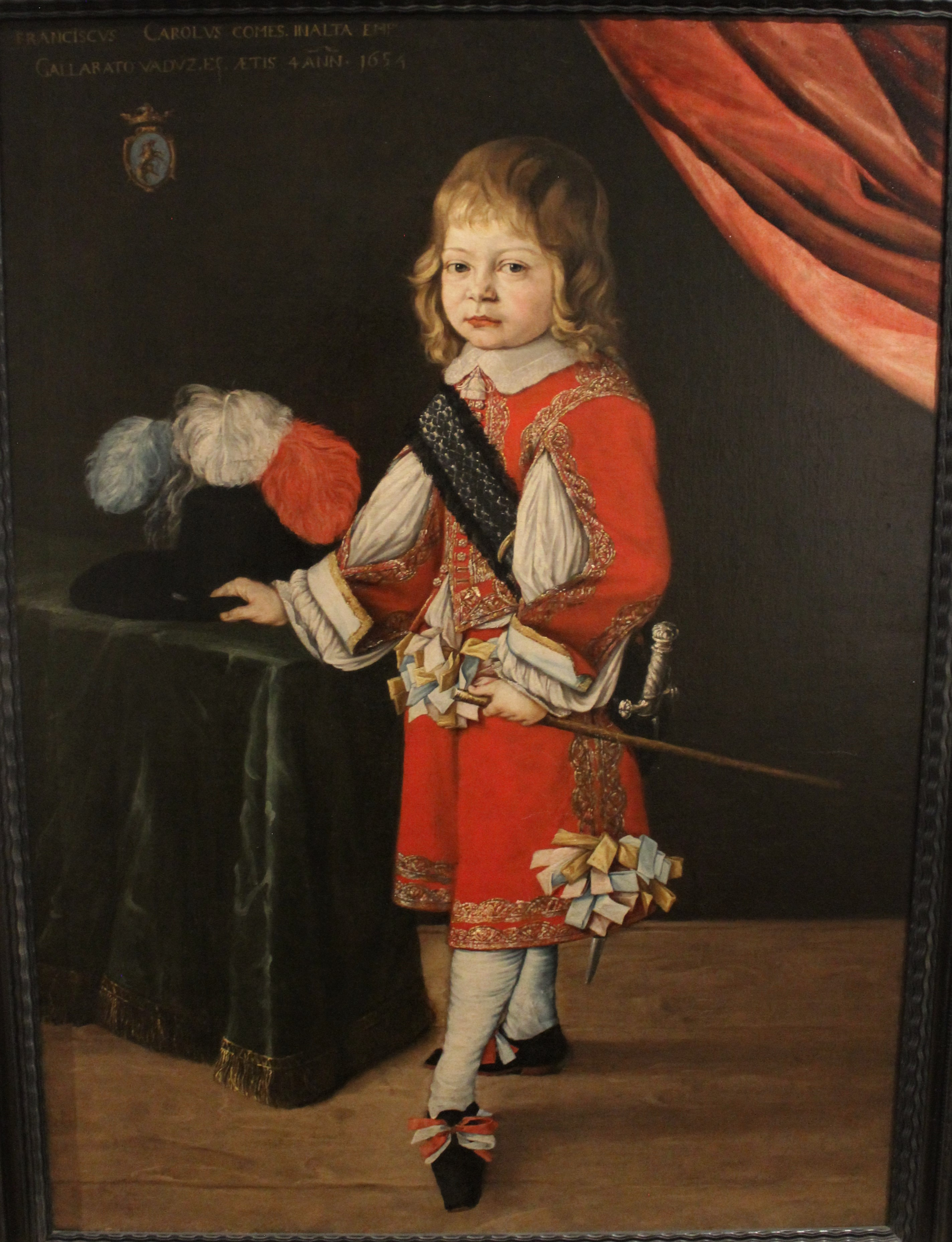 Franz Karl Anton von Hohenems (1650-1716) war der Sohn von Cornelia Lucia di Altemps und Graf Karl Friedrich von Hohenems. Das Kinderbildnis wurde 1896 von Fürst Johann II. von Liechtenstein für das geplante Landesmuseum in Vaduz geschenkt. Heute ist es Teil der Dauerausstellung des Liechtensteinischen Landesmuseums.